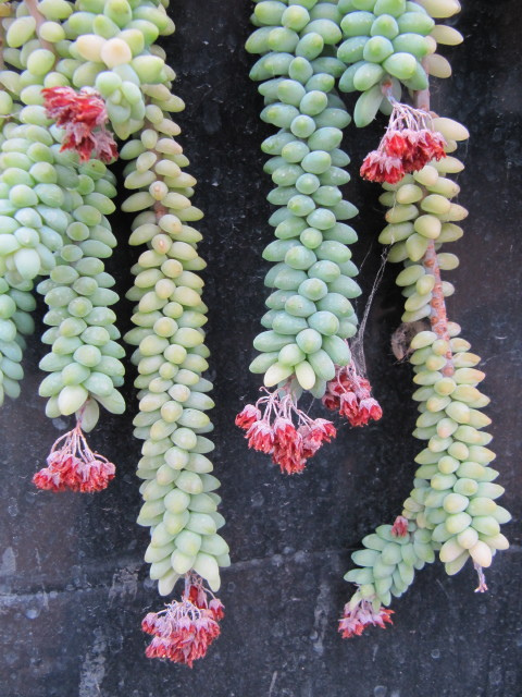 Sedum morganianum